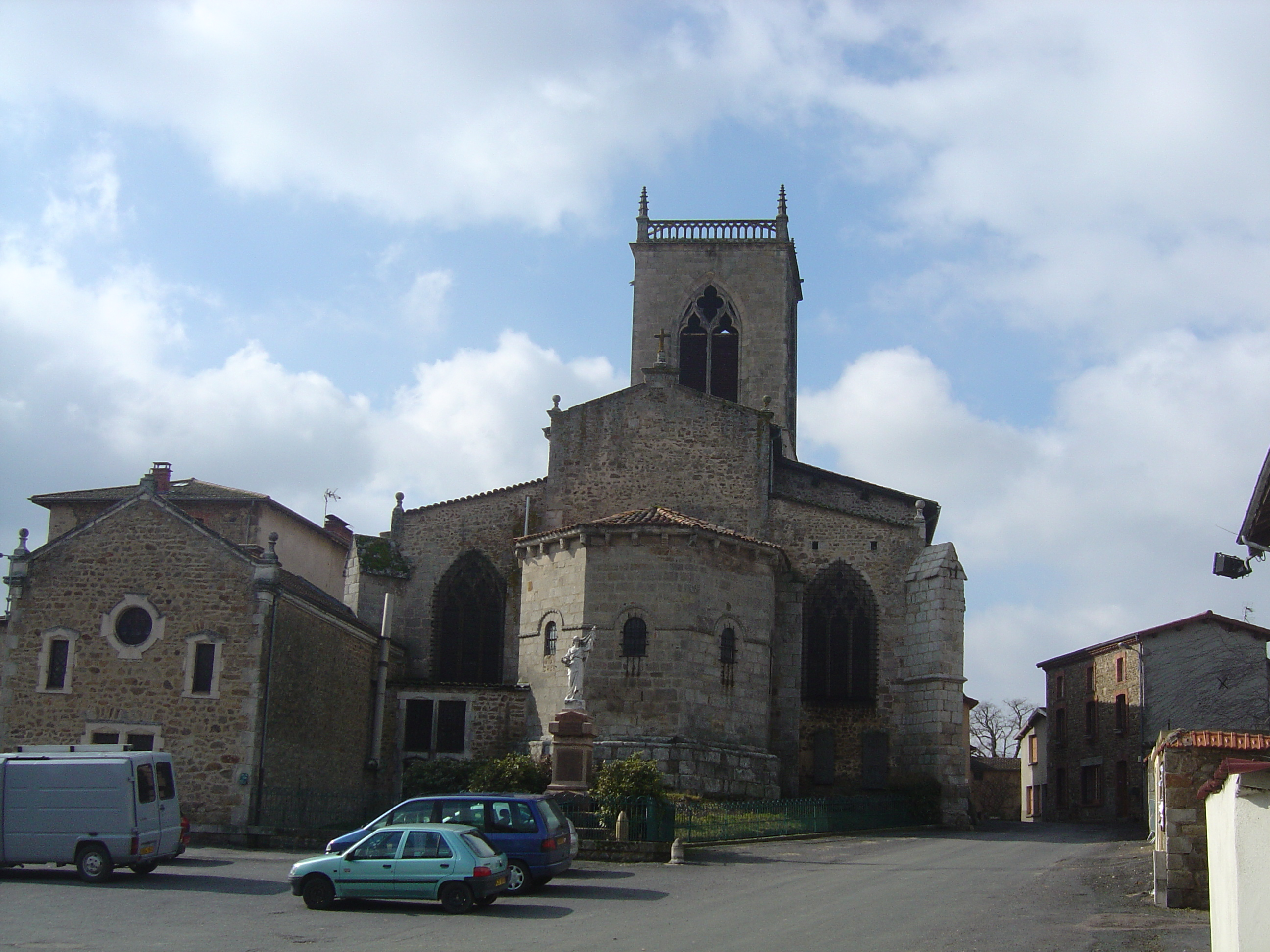 Eglise et monument aux morts à Augerolle